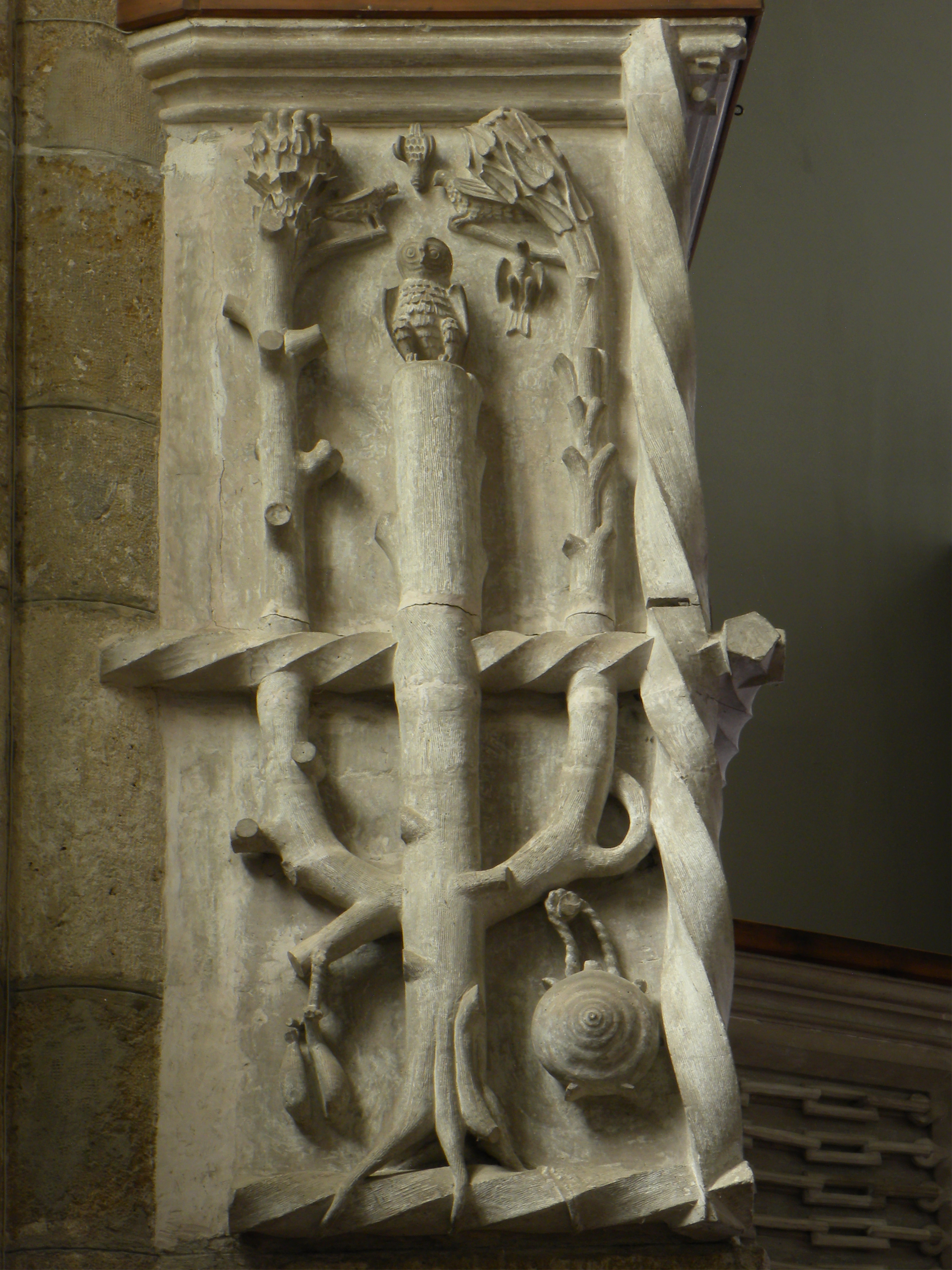 Kirchenfestungsanlage hl. Oswald - lutherscher Lebensbaum mit Eule